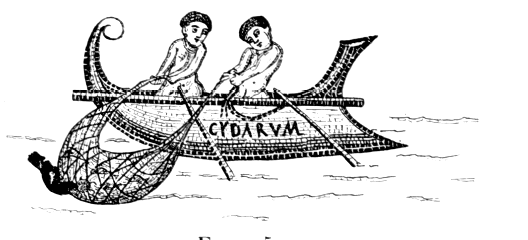 Cydarum Gauckler